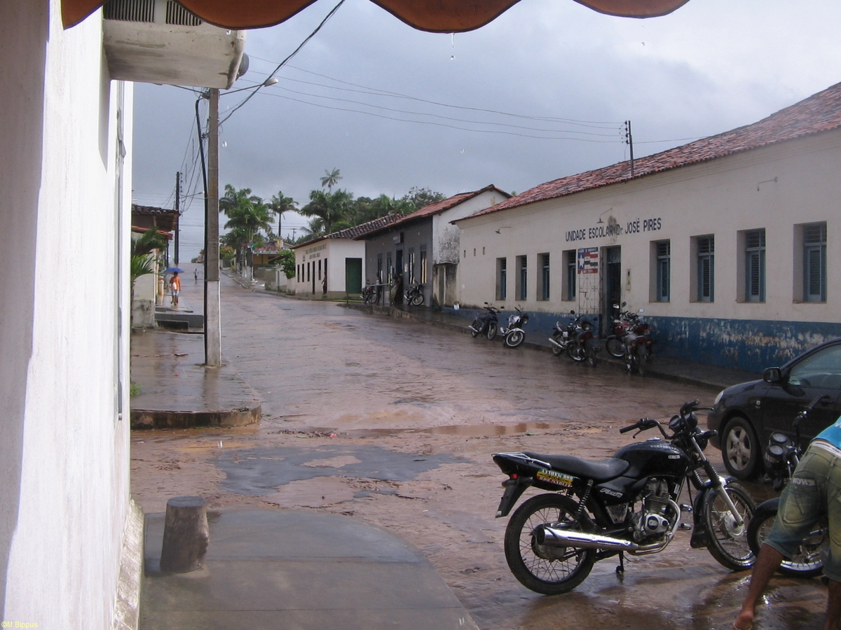 Cururupu Maranhao - Unidade Escolar José Pires